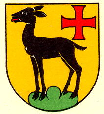 Wappen von Belfaux Kanton Freiburg Schweiz